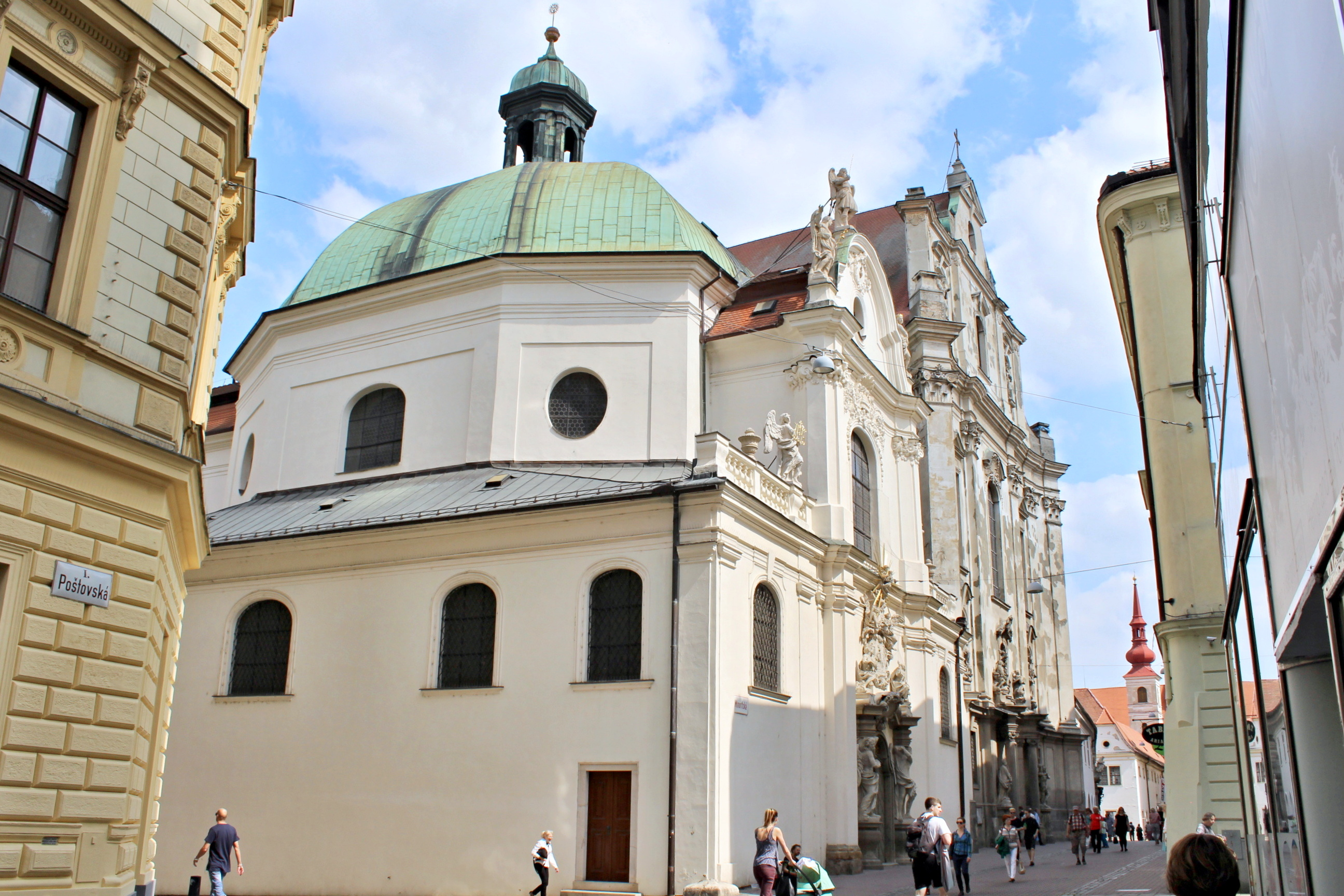 Kostel sv. Janů